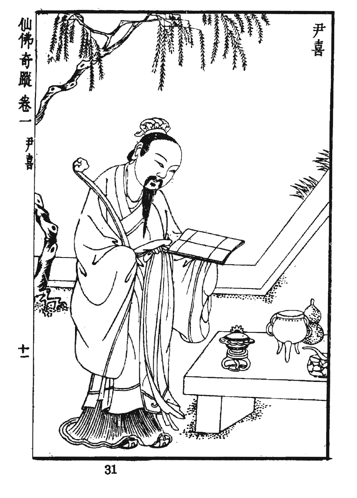 仙佛奇蹤插圖